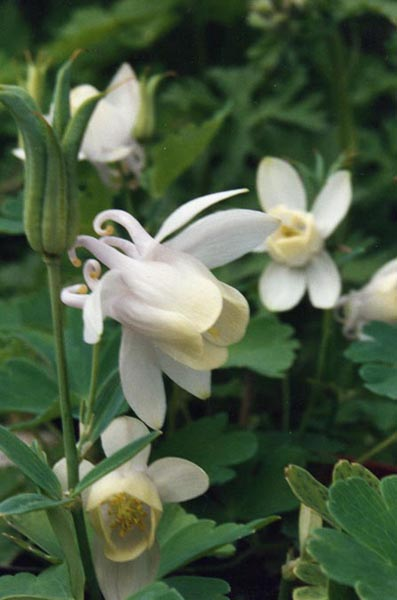 Aquilegia flabellata 'Alba'